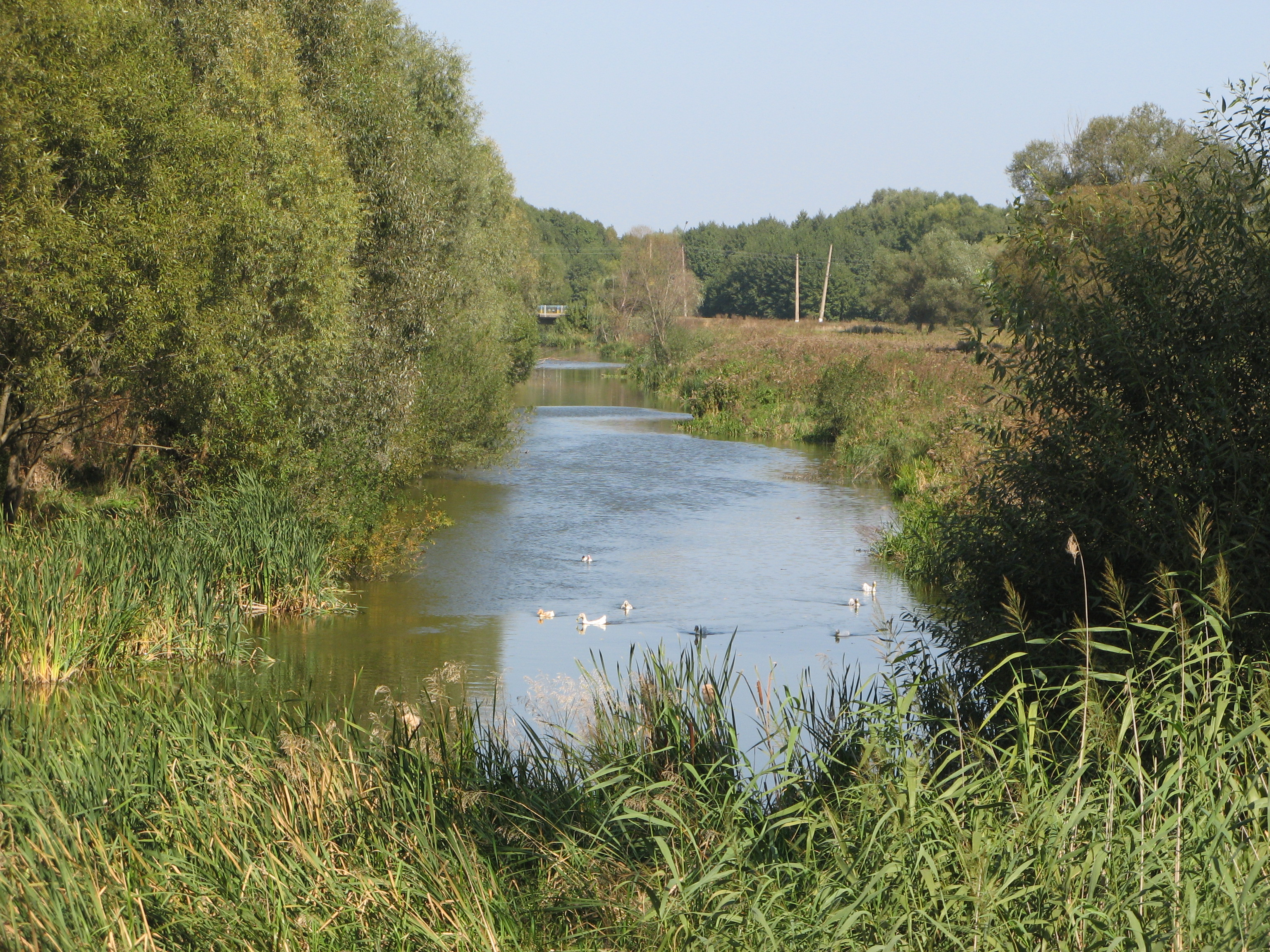 Єзуч у Конотопі (біля Загребелля)